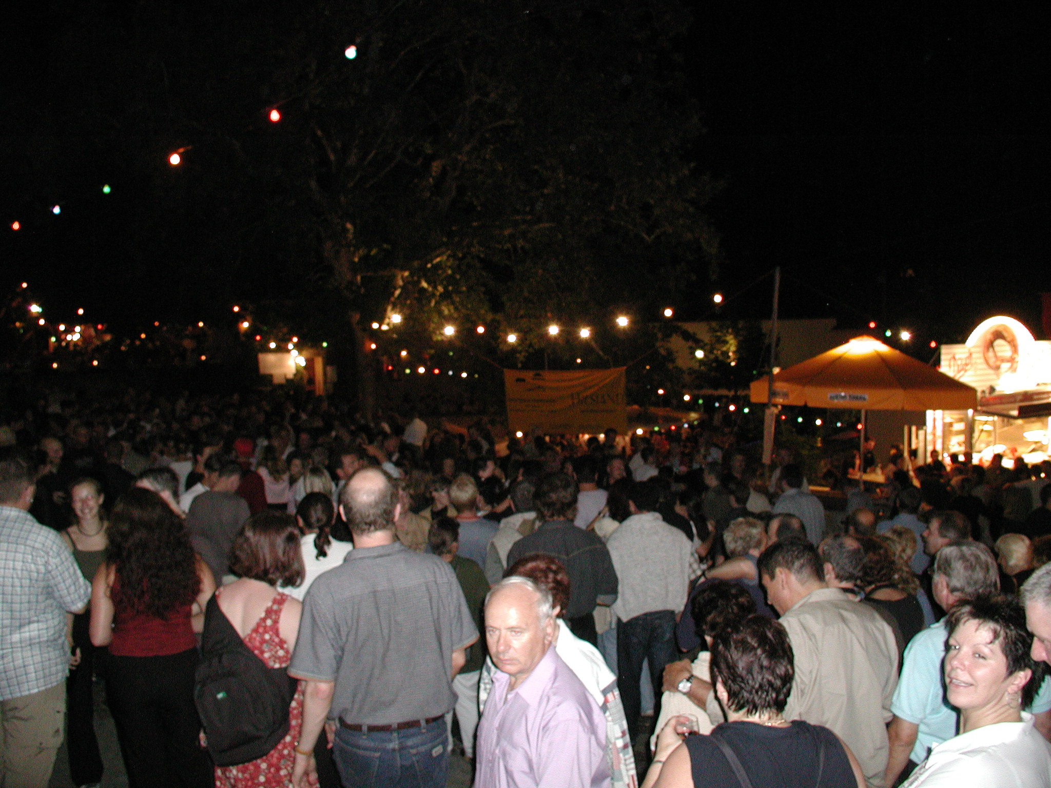 Blick über den Kellerweg am Julianenbrunnen während des Kellerwegfestes.